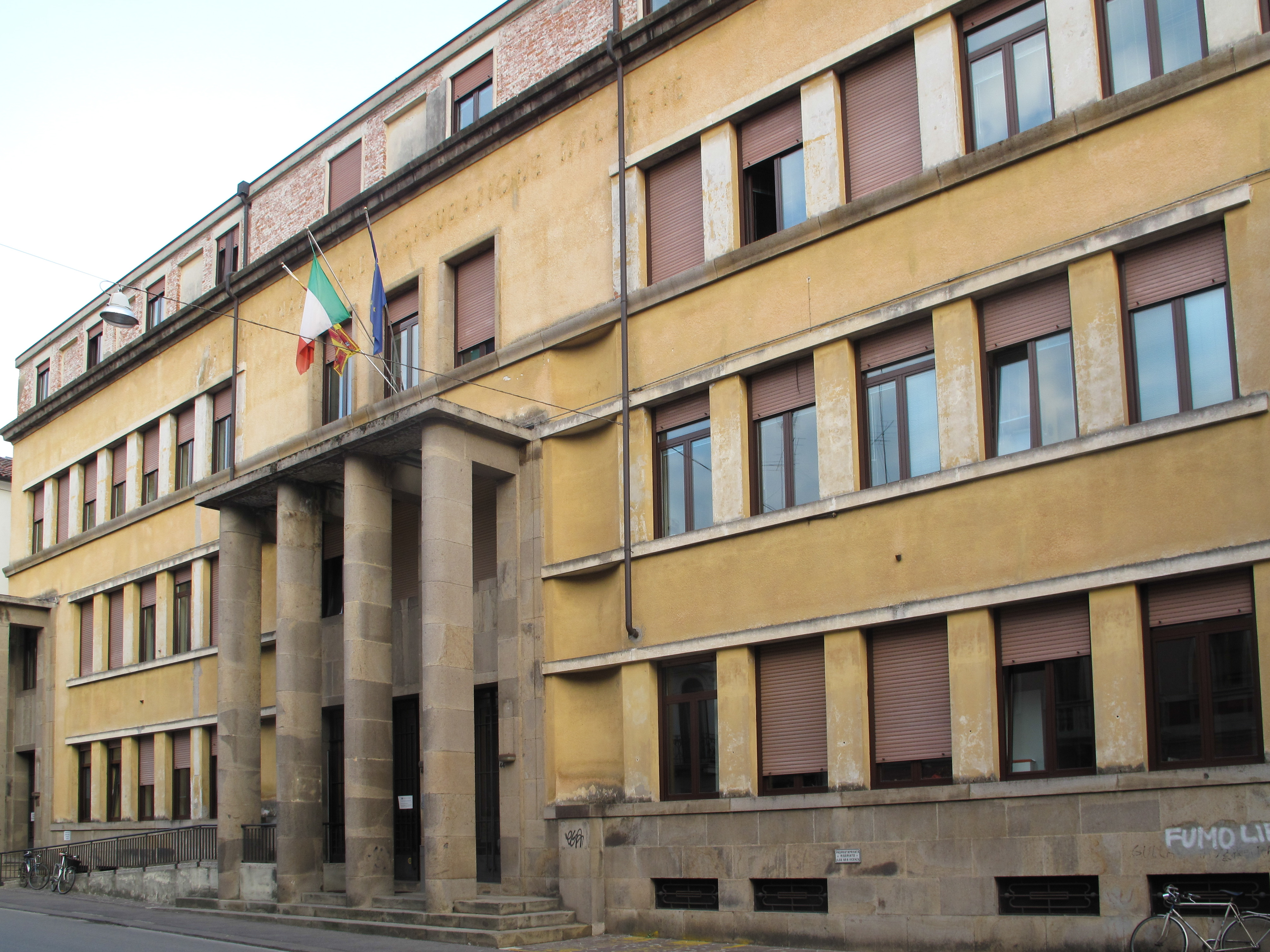 Palazzo ex-INAM